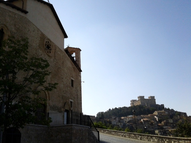 Chiesa di Santa Maria delle Grazie, sullo sfondo il castello